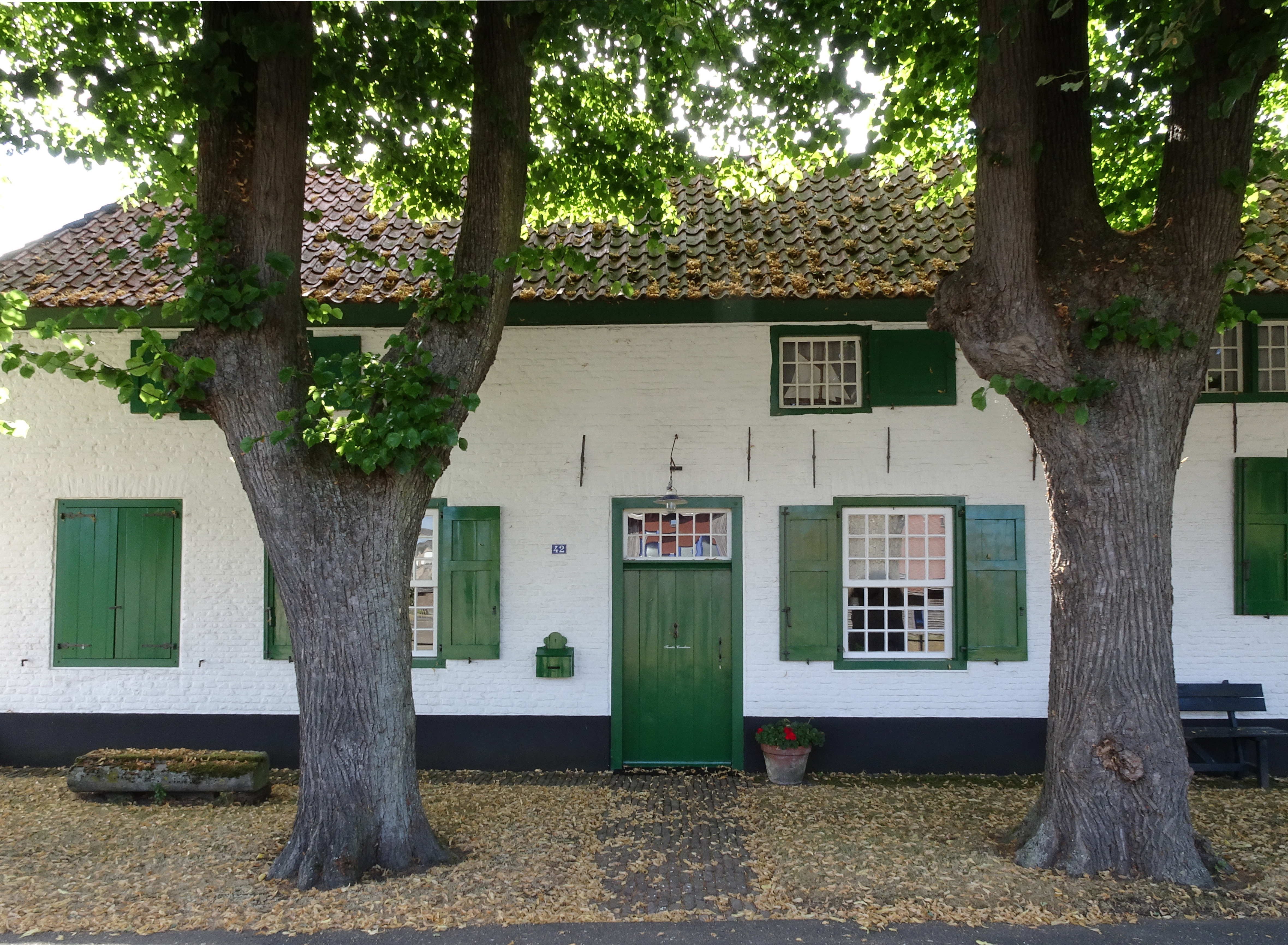 Kleve-Wardhausen, Johanna-Sebus-Straße 42. Monument, boerderij, circa 1800